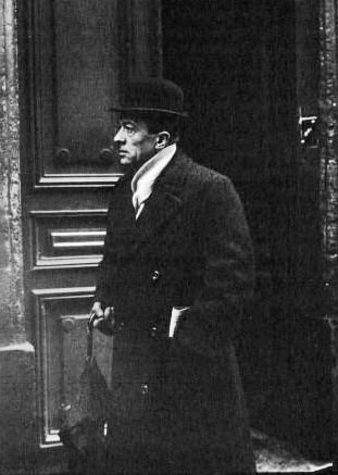 Mr Gal(i)paux devant la porte Saint Martin : photographie de presse